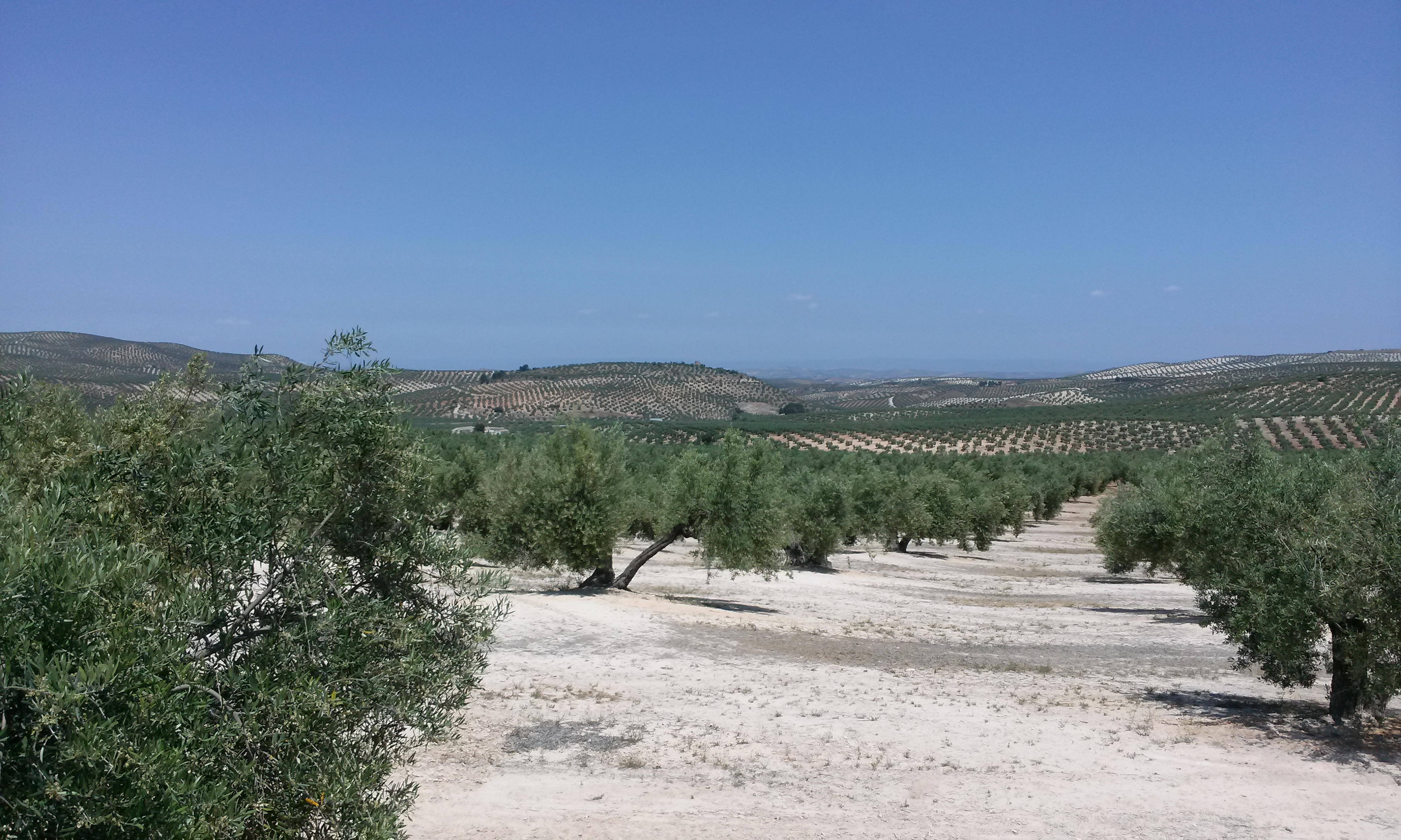 Vistas de Torre Olvidada desde el cortijo La Iglesia.